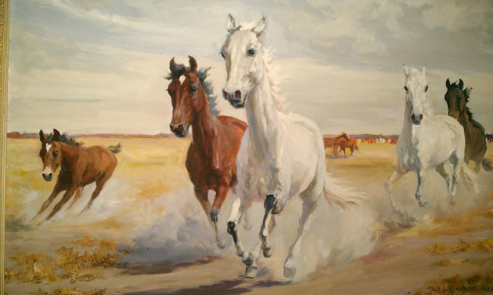 Das Bild zeigt ein Oelgemaelde des Malers István von Somogyi